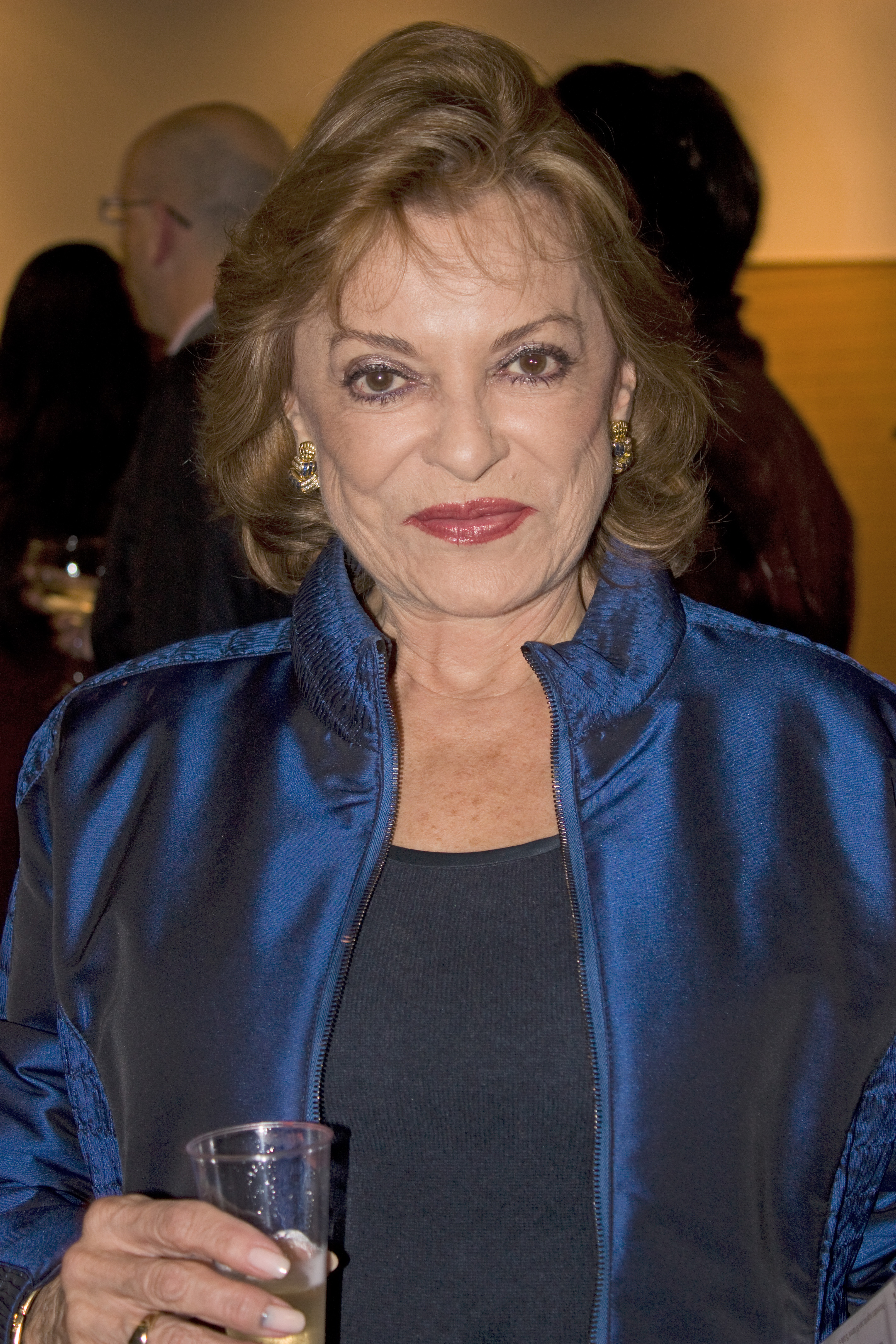 Retrato de Gloria Zea